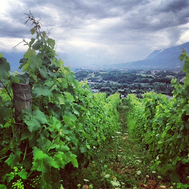 Vignoble à Saint-Alban-Leysse